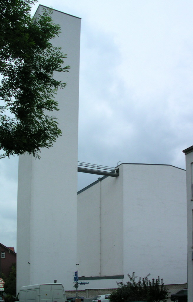 Aachen, Fronleichnamskirche, Turm